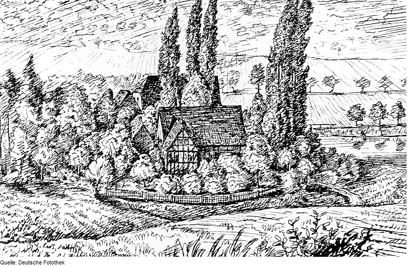 Original image description from the Deutsche Fotothek Dresden-Mockritz. Mockritzer Mühle 1876, aus: Bergblumen 6. Jg., Nr, 5, S. 36